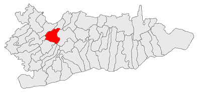 Categorie:Hărţi ale judeţului Călăraşi